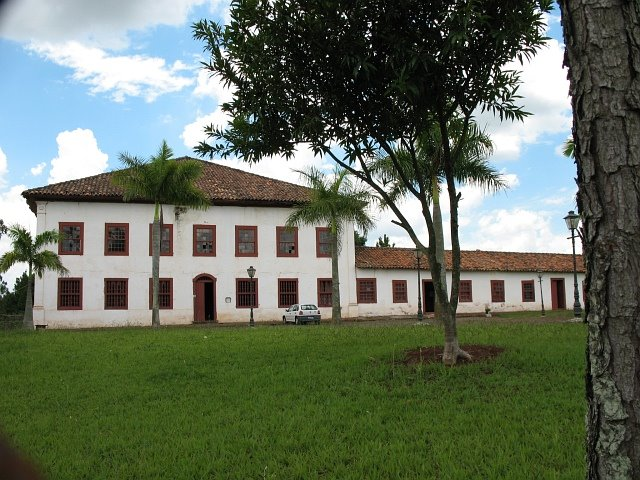 Museu Histórico e Pedagógico "Conselheiro João Carrão"